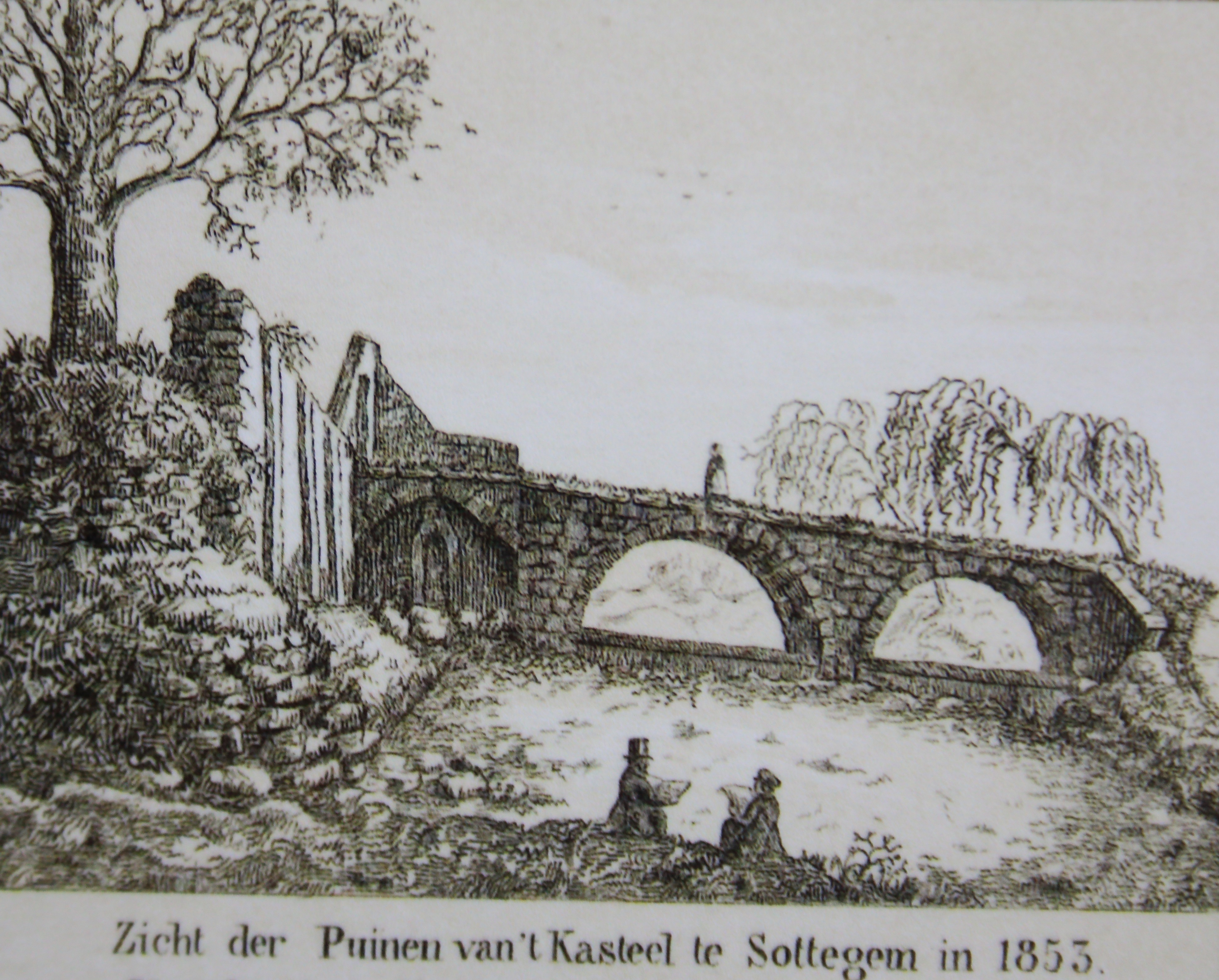 brug Egmontkasteel, Zottegem, Vlaanderen, België (in: 'Gedenkbeelden van Lamorael van Egmond', L.J. Van Peteghem, 1853)